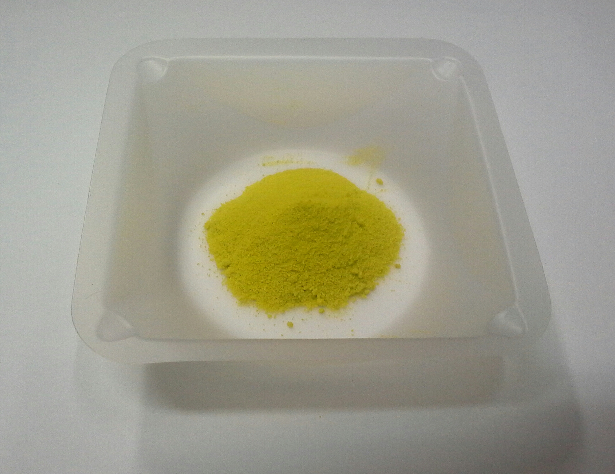 Кристаллы фосфорномолибденовой кислоты